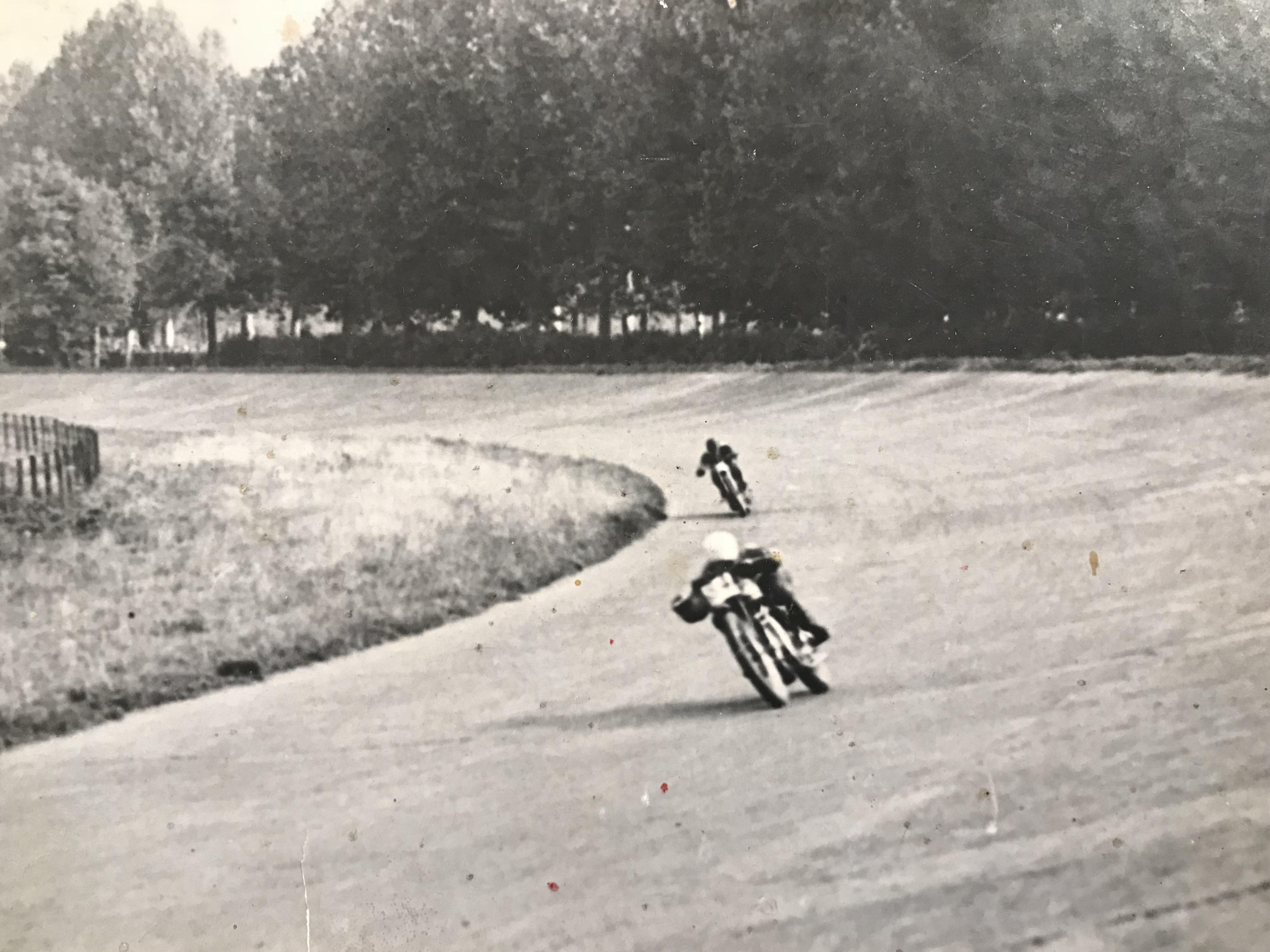 Mario Colombo impegnato nella vecchia curva sopraelevata a Monza